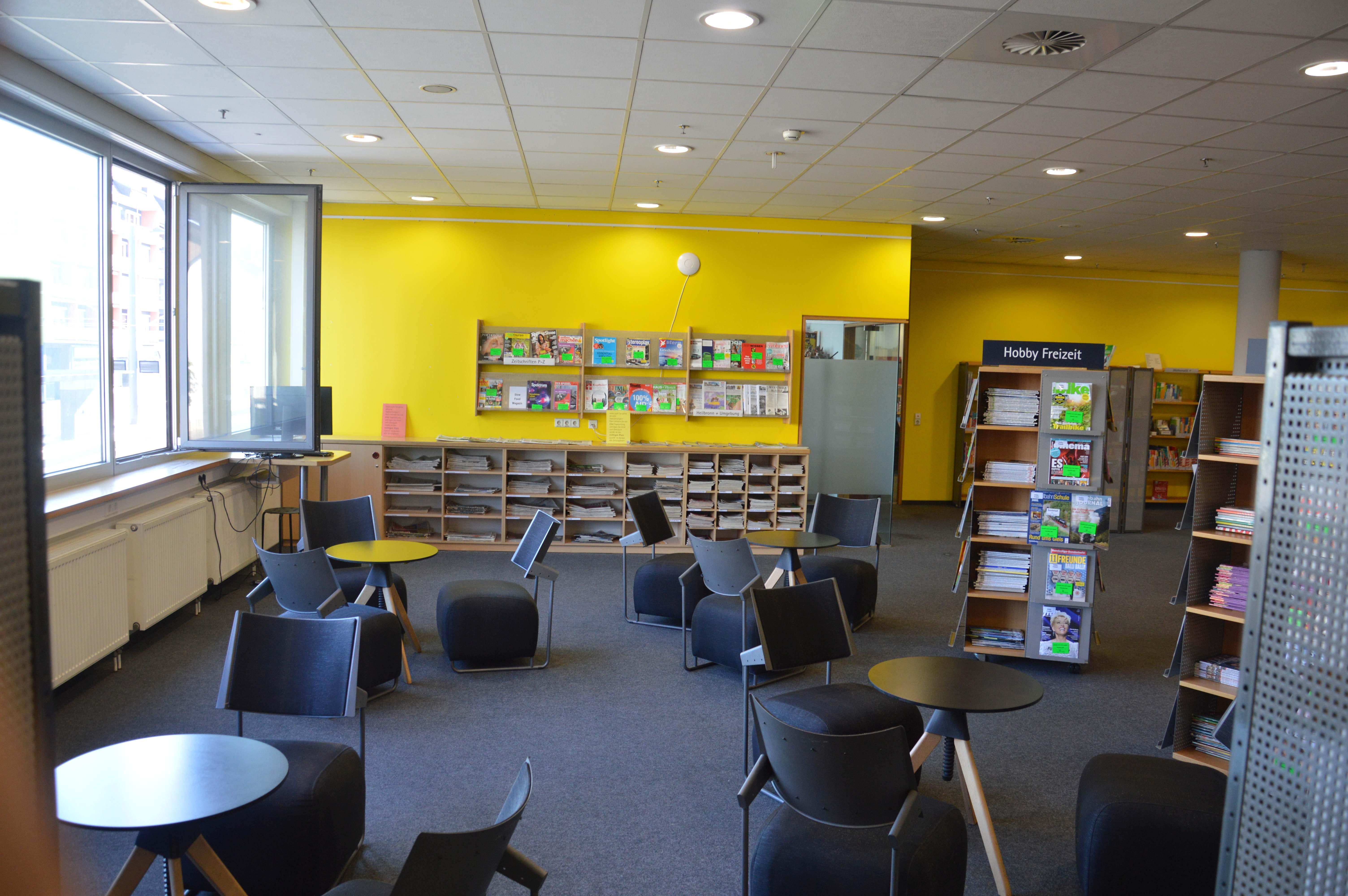 Zeitenschriften und Lesebereich der Stadtbibliothek Heilbronn